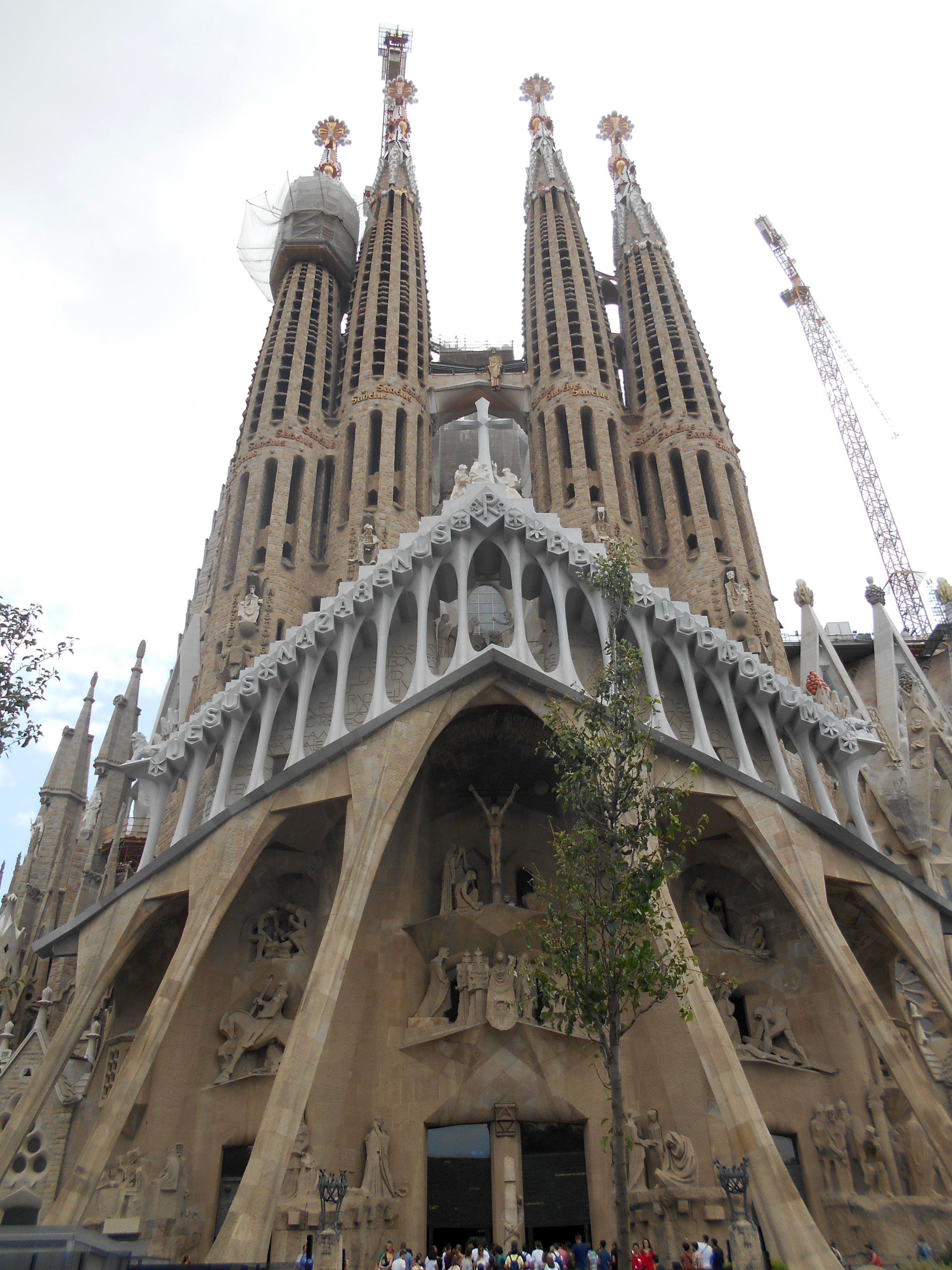 Fachada de la Pasión.